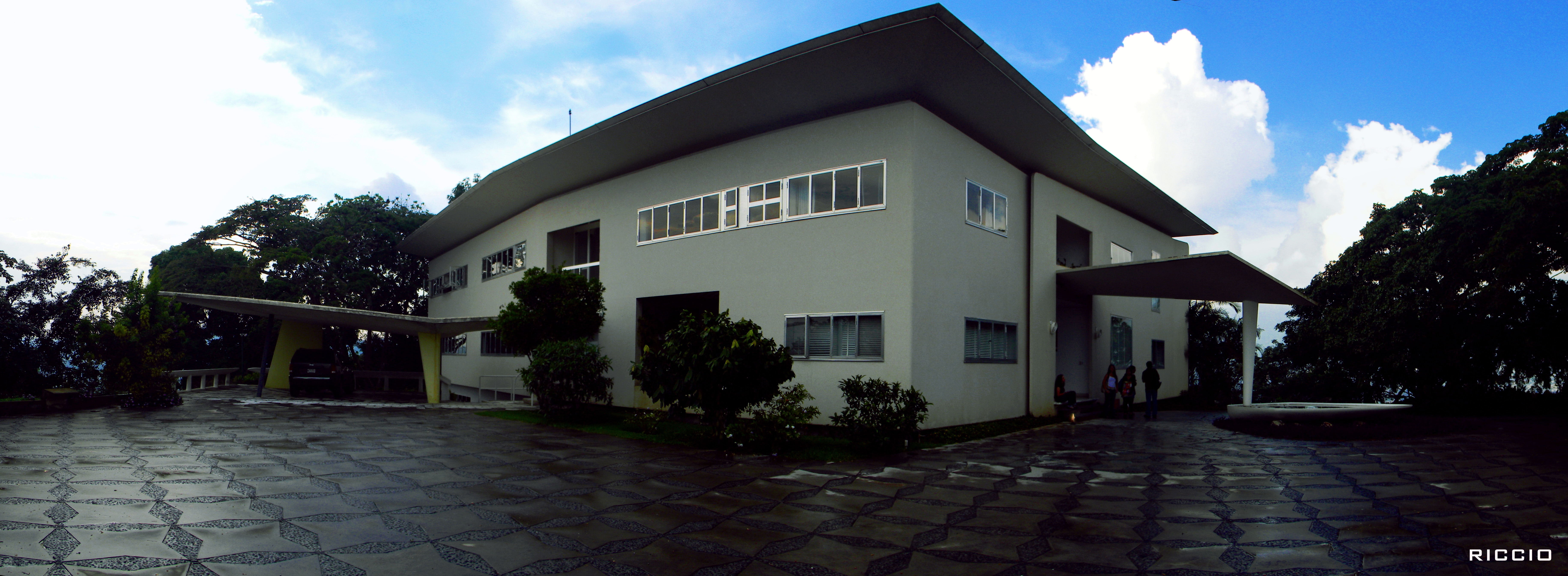 Villa Planchart frente